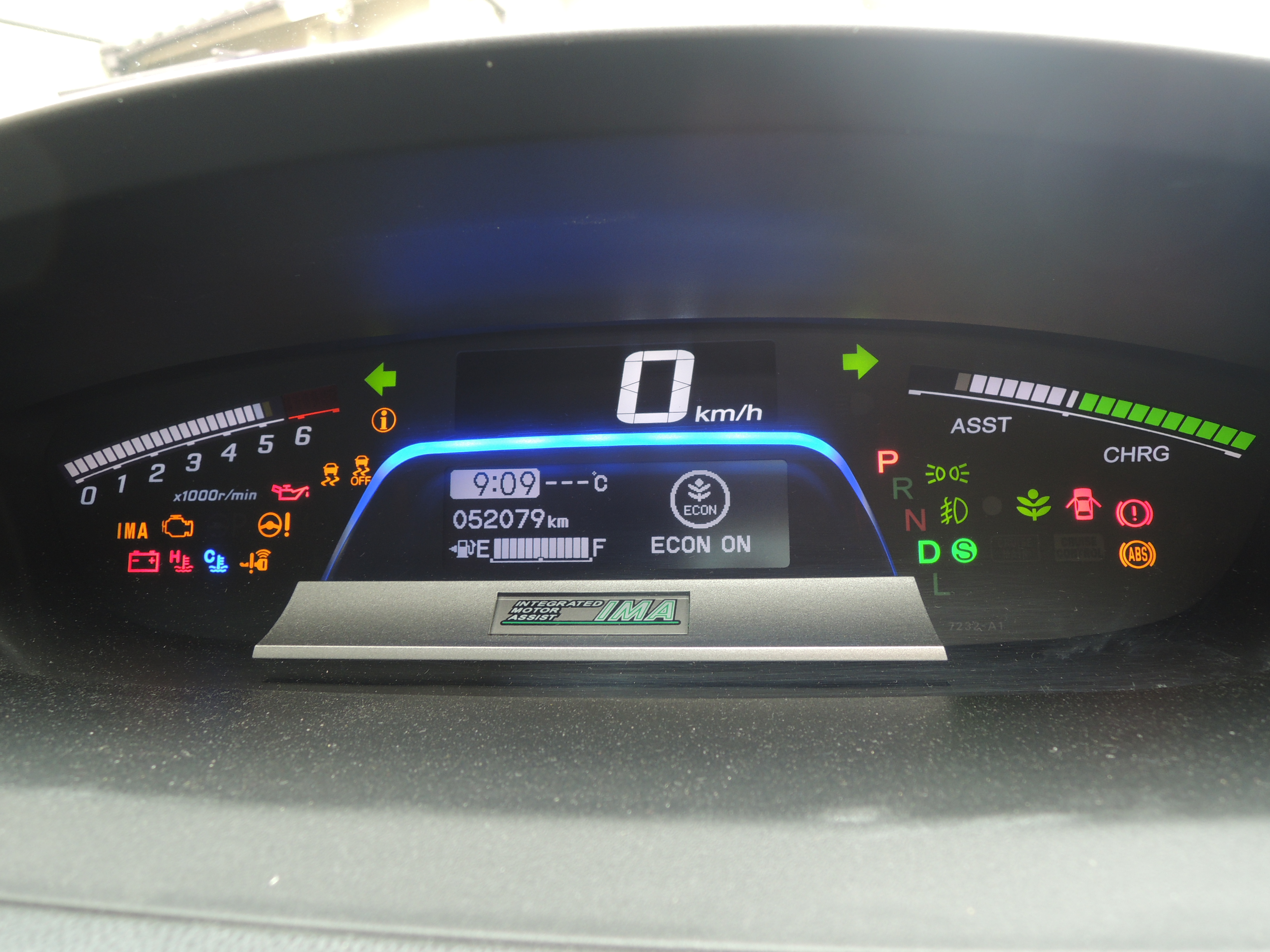 ホンダ フリードハイブリッド デジタルメーター起動時の表示